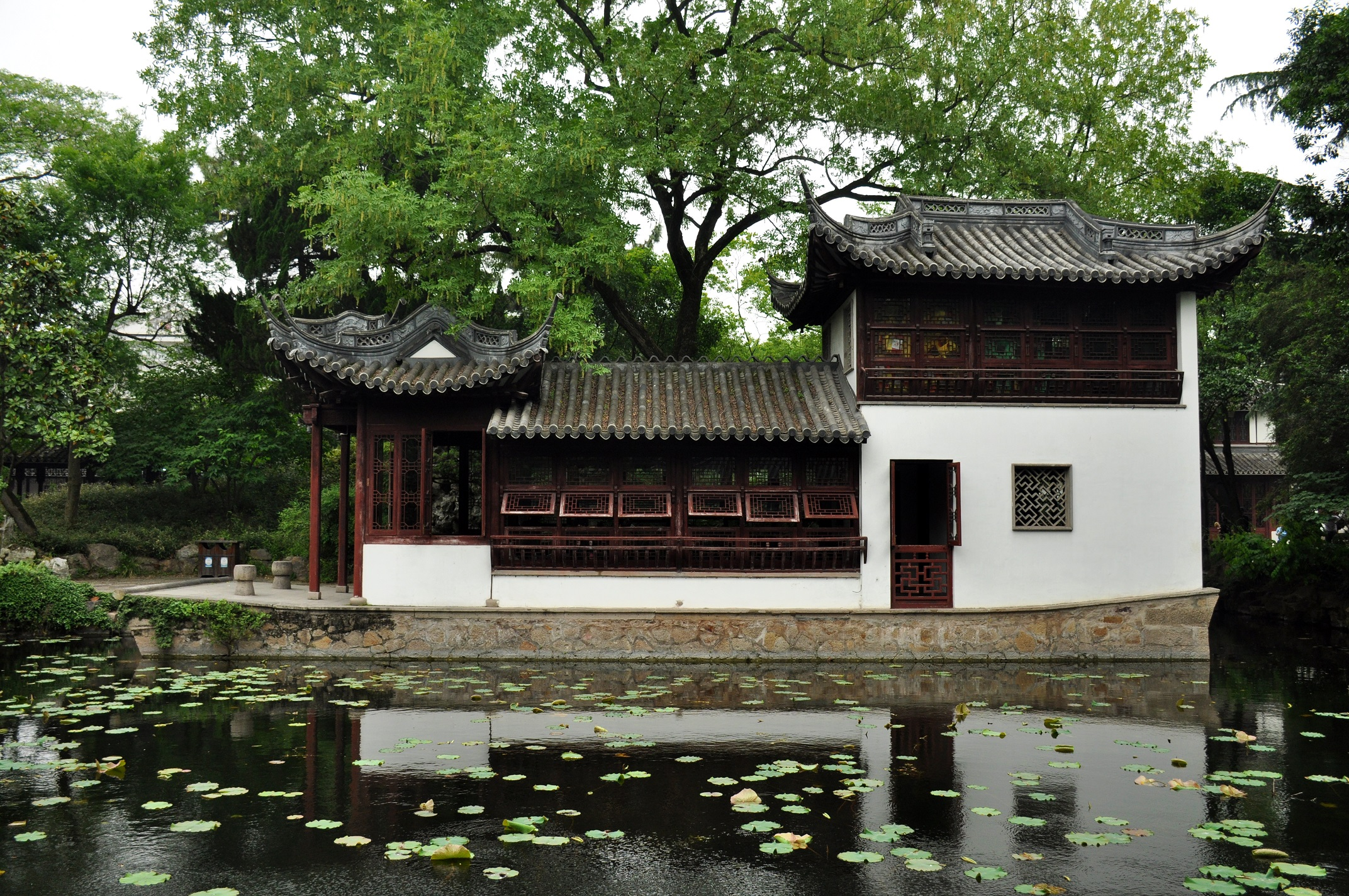 中文（中国大陆）: 古猗园 不系舟